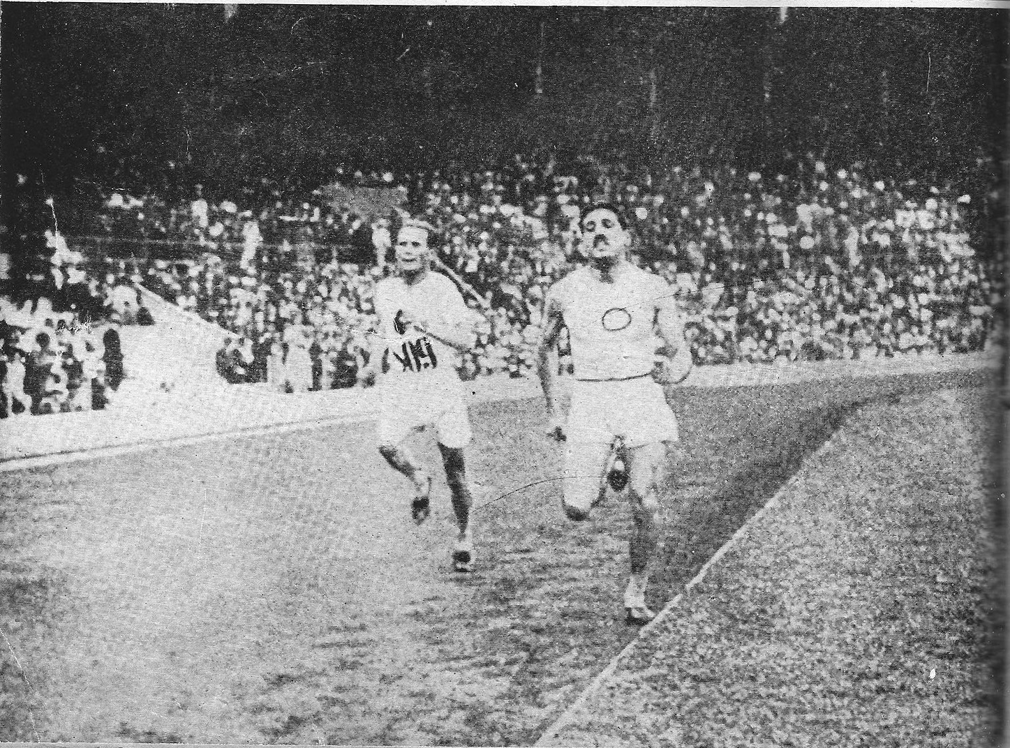 JO de 1912, Jean Bouin 5 000 en tête à 30m de l'arrivée.